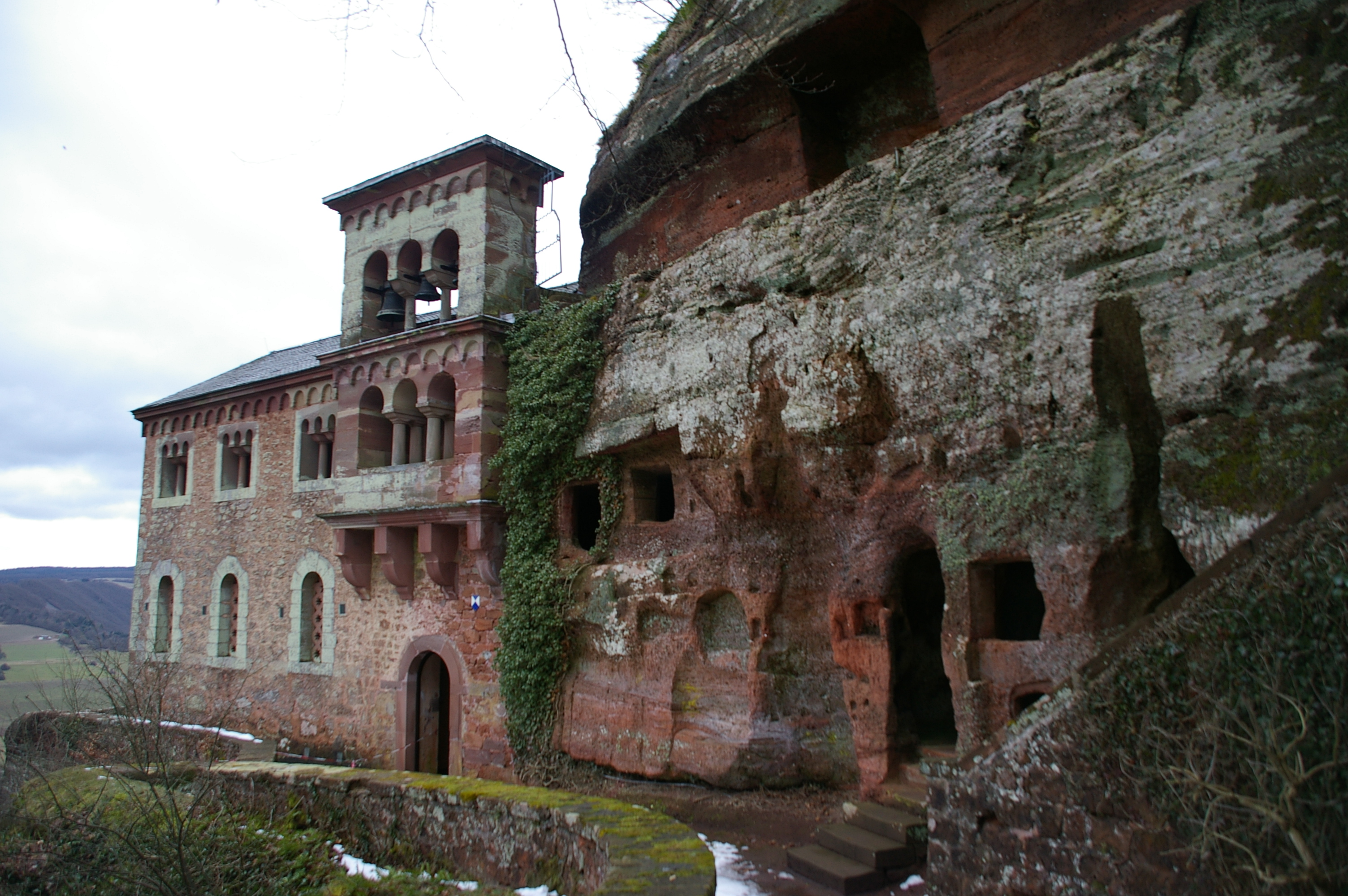 Klause Kastel, Felsenkapelle und Grabkammer